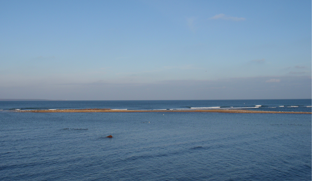 Liivakari, taamal Naissaar